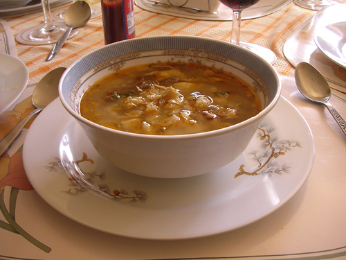 Plato de calapurca, servido en la mesa de una familia iquiqueña, en Chile.